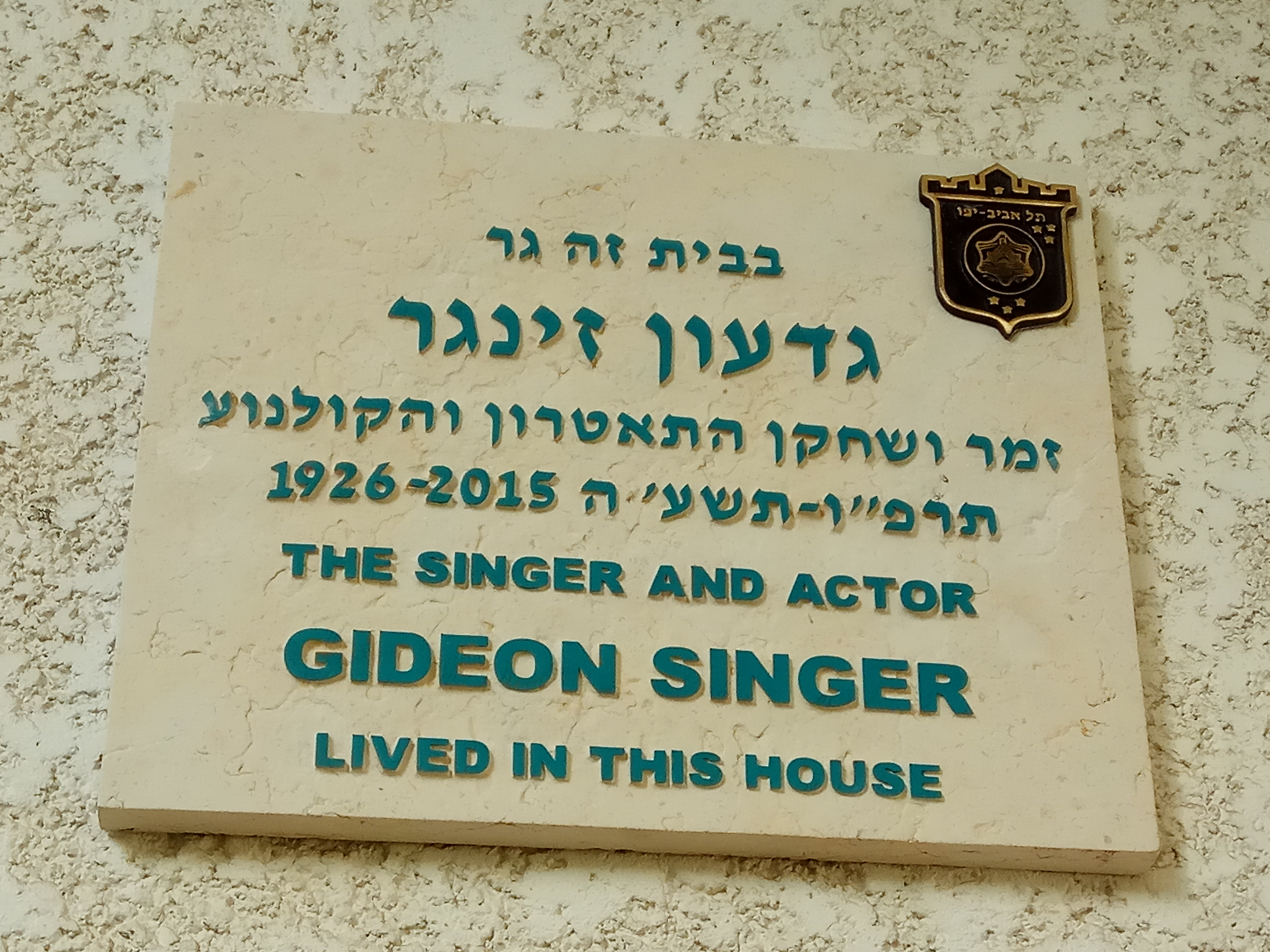 לוחית זיכרון לגדעון זינגר בכניסה לביתו ברחוב ליסין 23 בתל אביב